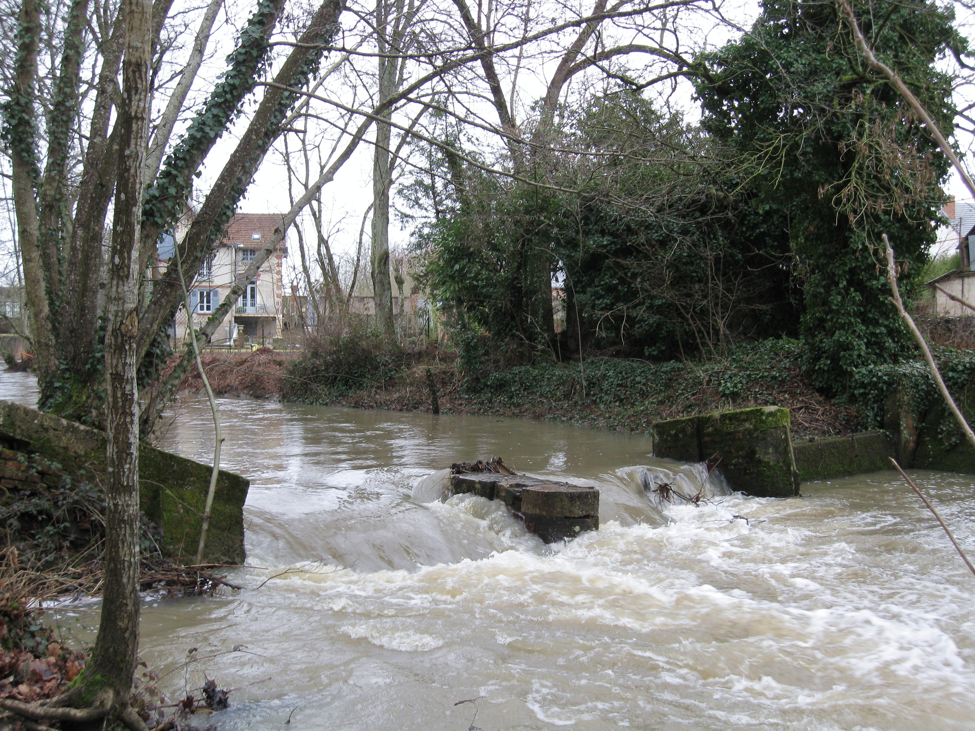 Le Beuvron, Lamotte-Beuvron, Loir-et-Cher, France